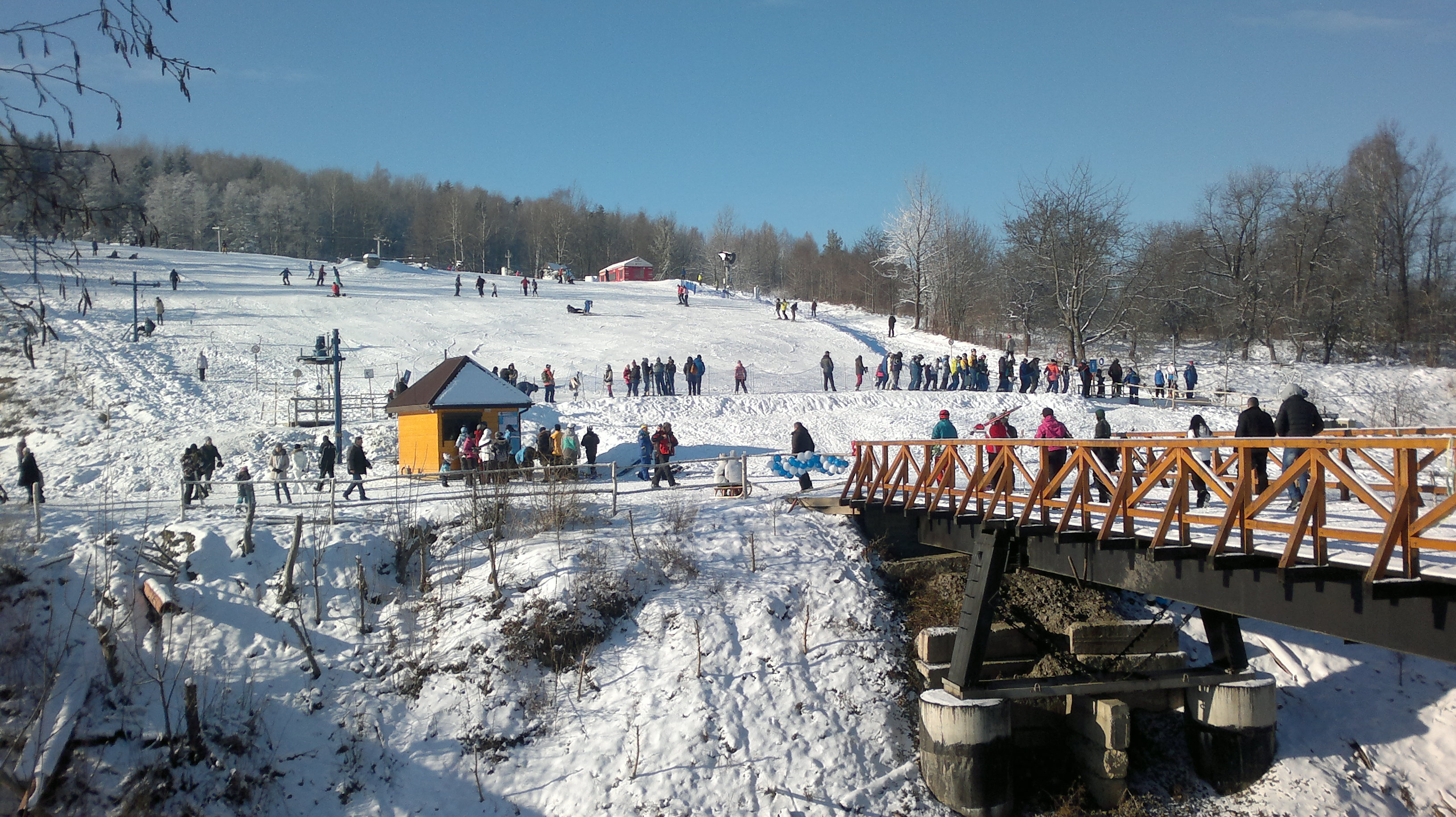 Зима 2016